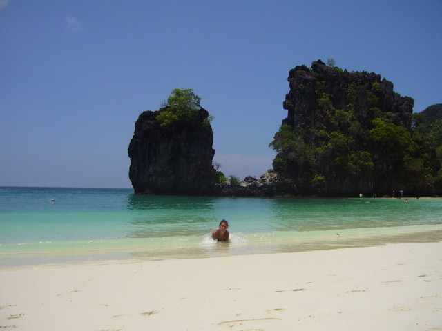 Koh Hong (Krabi)